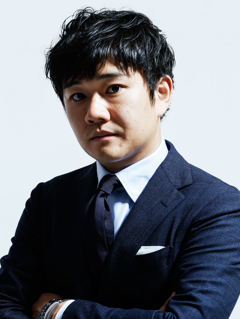 Gen Matsuda